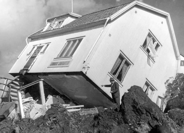 1950 drabbades Surte av ett stort jordskred. En man beskådar sitt förstörda hus.